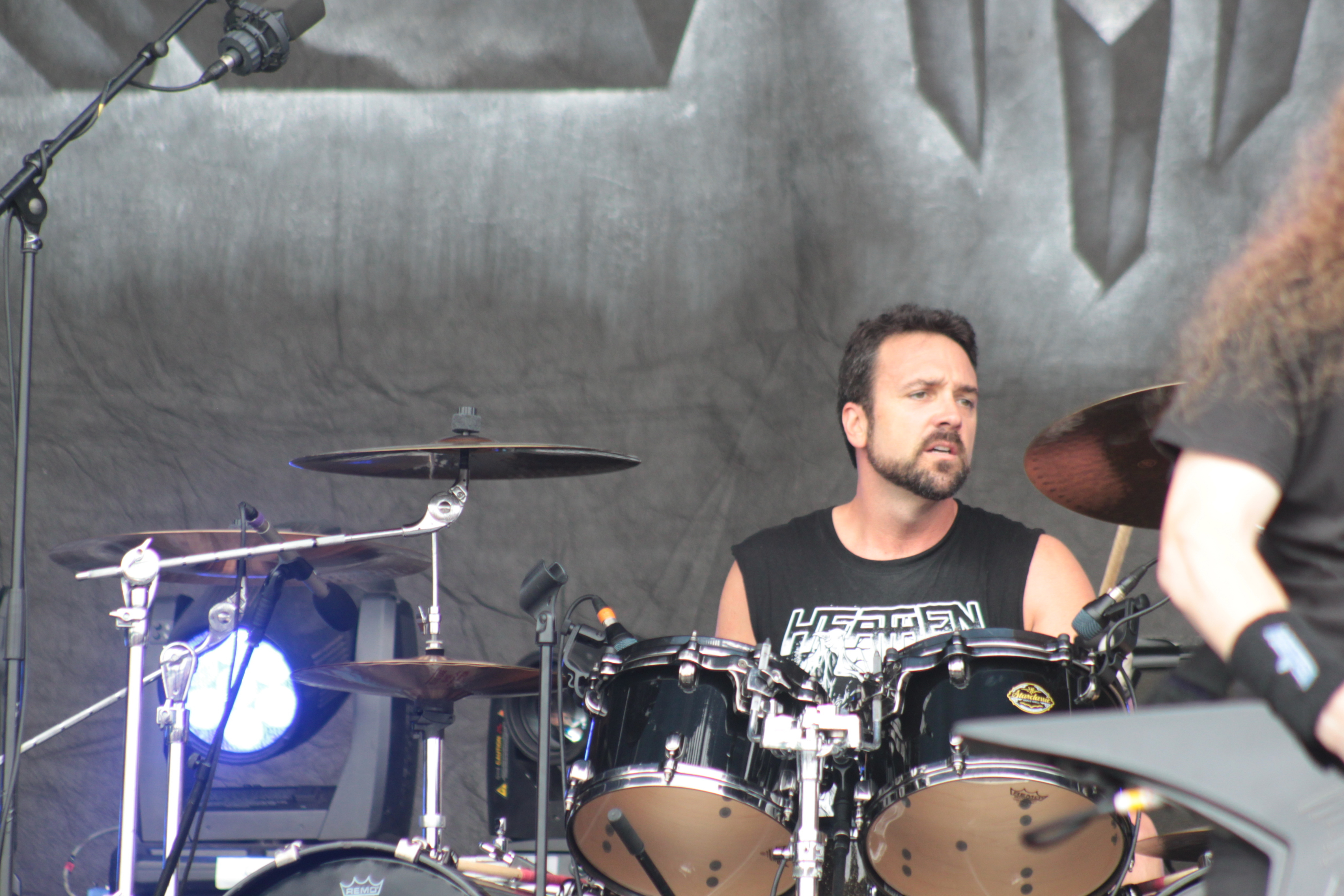 Jon Dette, Heathen, Helfest 2013, Fr-44-Clisson.